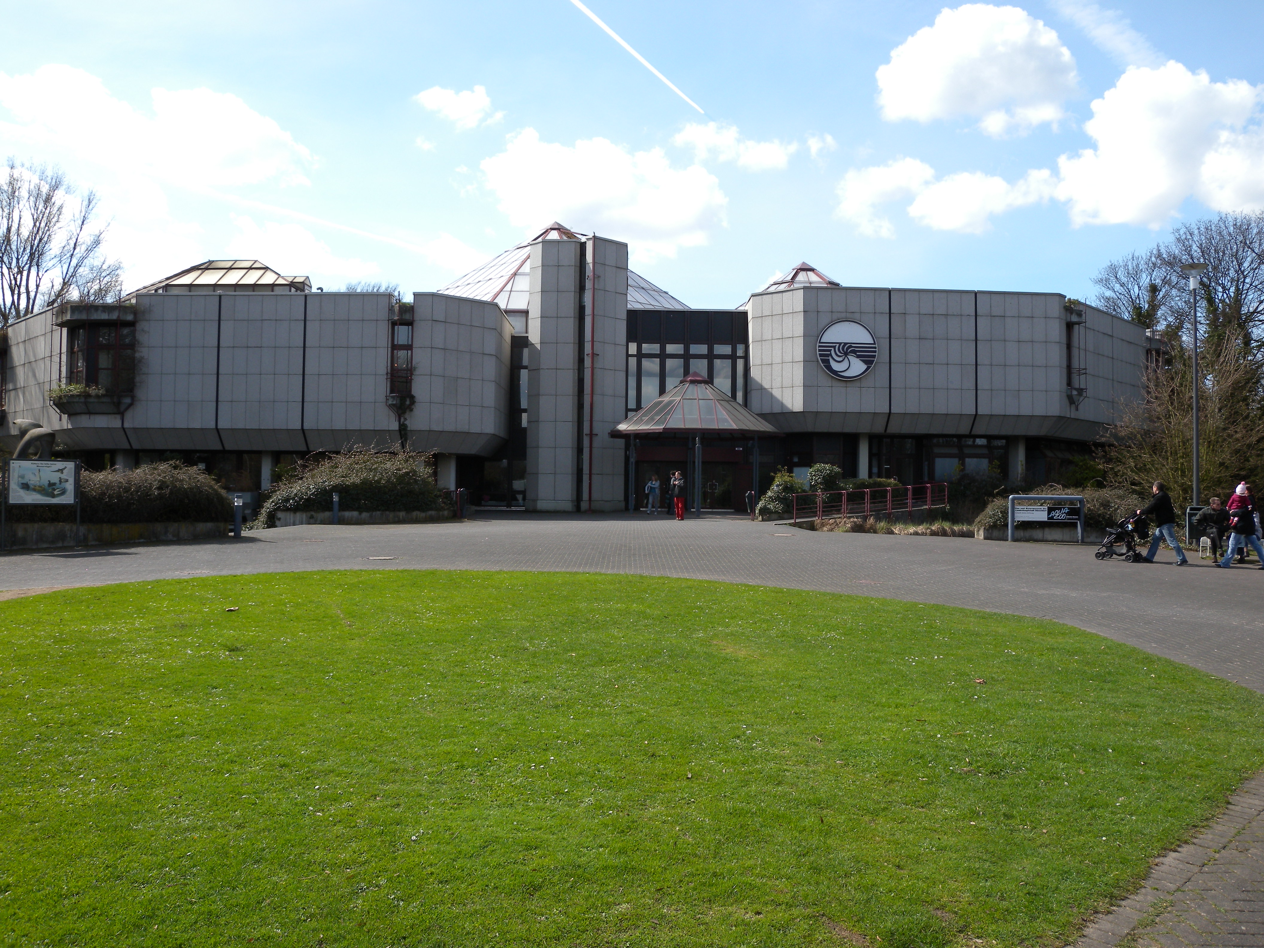 Aqua Zoo in Düsseldorf